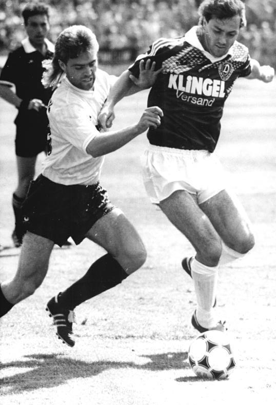 ADN-Häßler-26.5.90-Dresden-Fußball-Oberliga Dresden-Leipzig Dynamo Dresden konnte seinen im Vorjahr errungenen DDR-Fußballmeistertitel erfolgreich verteidigen. Mit 3:1 bezwangen die Elbstädter die Leipziger Lok-Elf - hier eine Zweikampf-Szene zwischen dem Dresdner Matthias Döschner (r.) und Stefan Marx - und behaupteten sich damit gegen die vor dem letzten Spieltag punktgleichen Rivalen Karl-Marx-Stadt (Chemnitz) und Magdeburg.